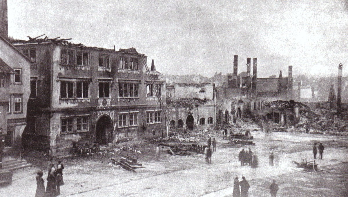 Ausgebranntes Rathaus und weitere Brandruinen von Stadtbrand 1874 in Meiningen